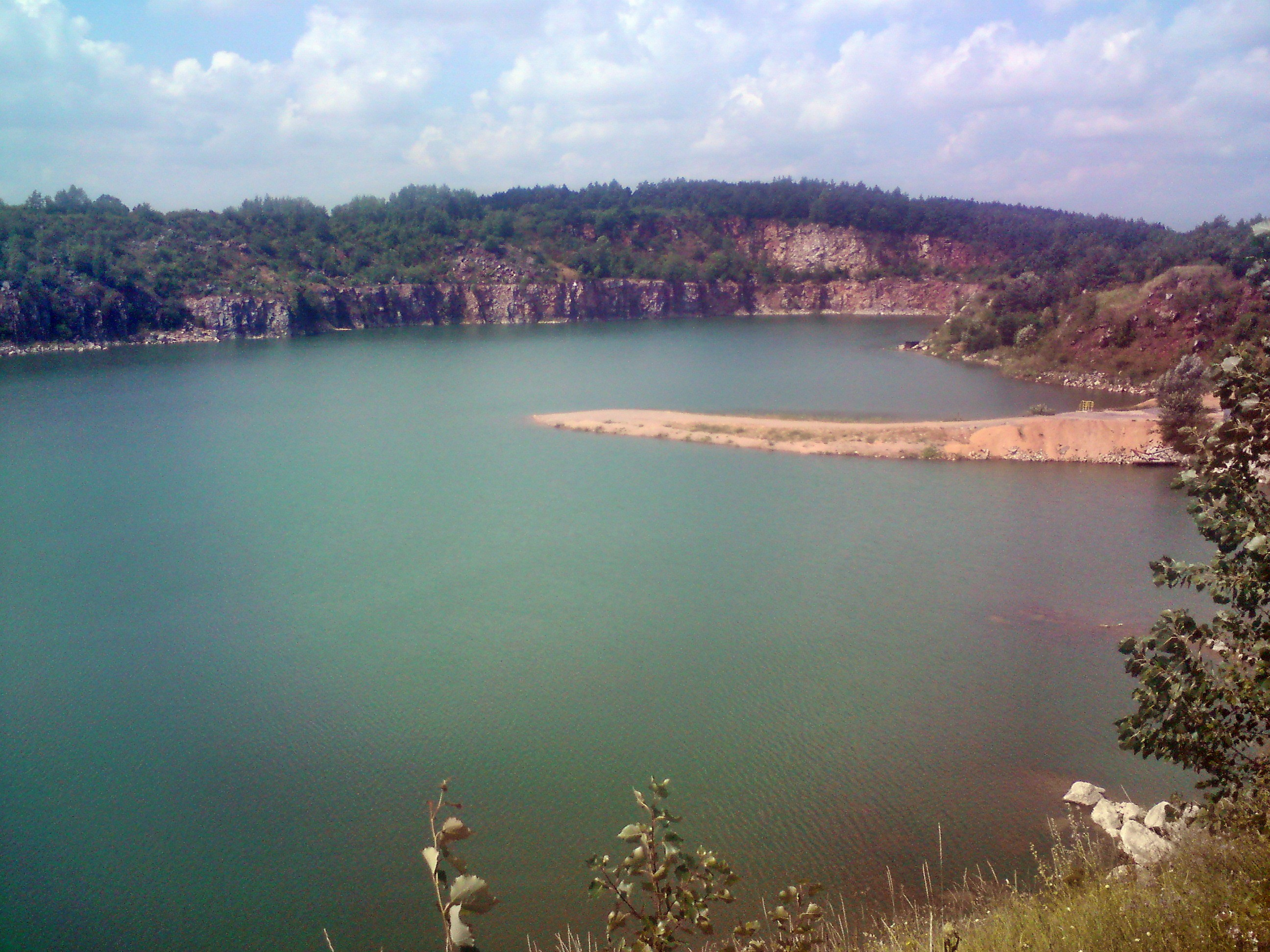 Kamieniołom Zgórsko położony na terenie gminy Sitkówka-Nowiny.